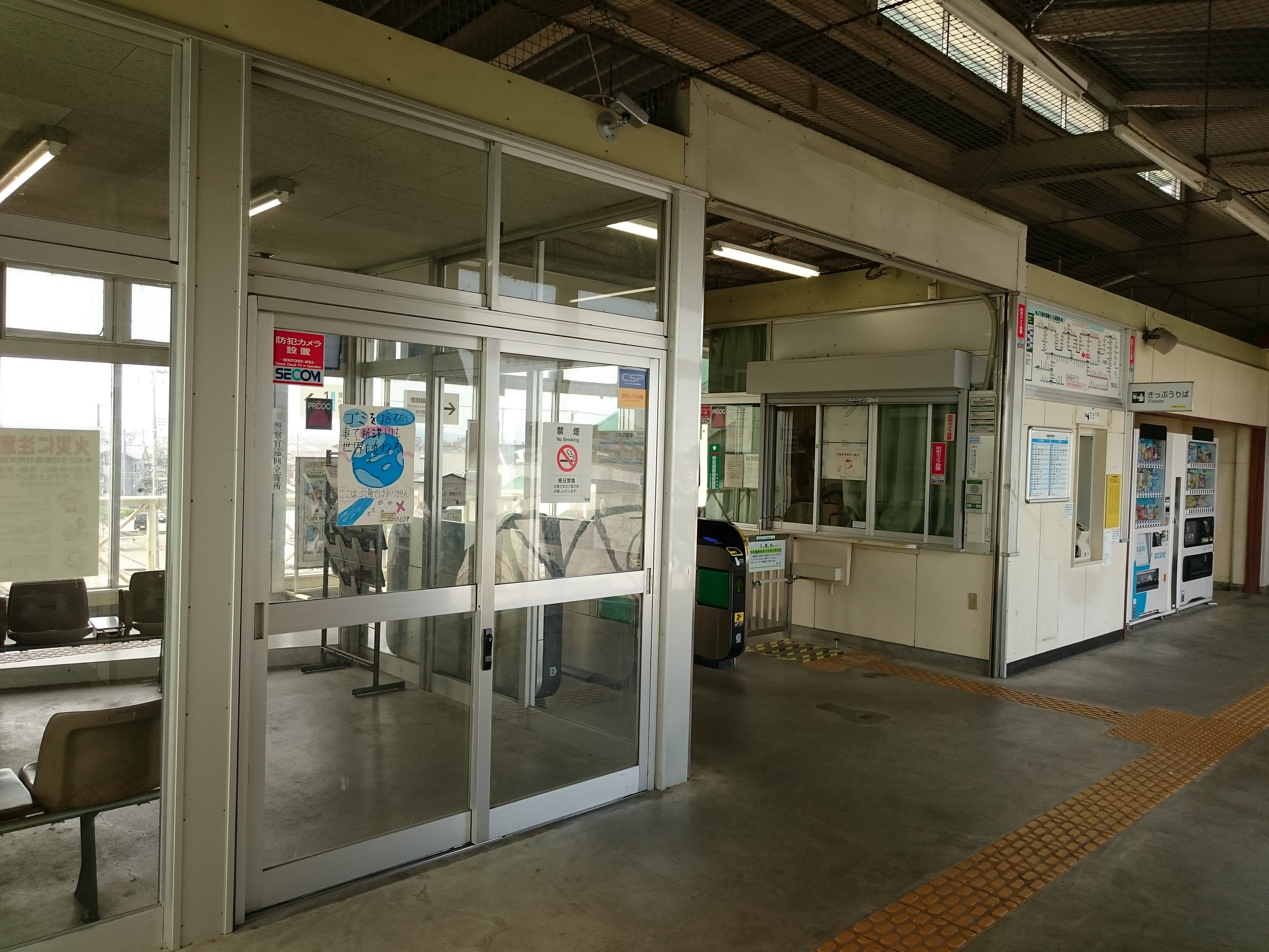 さつき野駅のコンコース